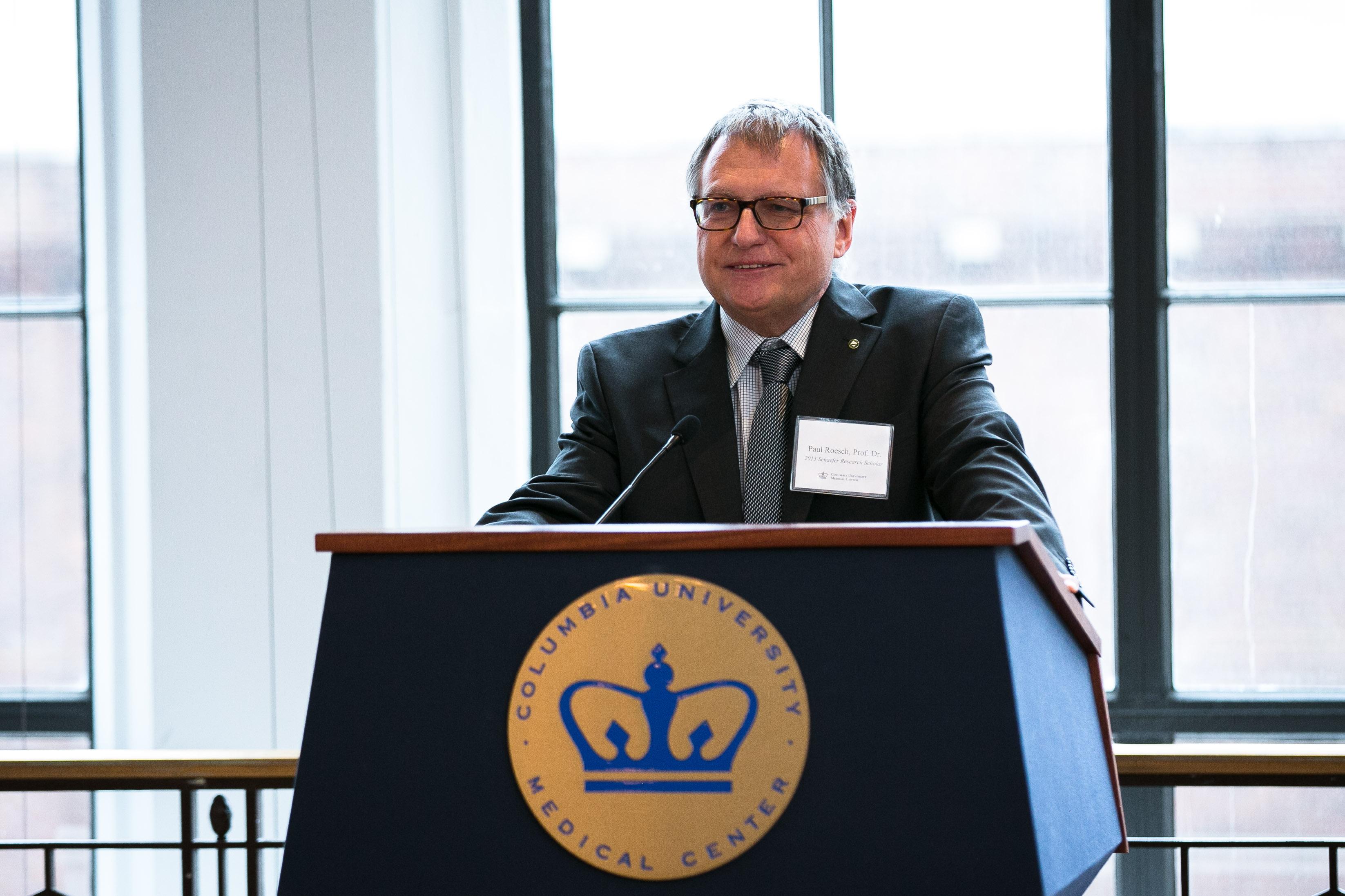 Dr. Paul Rösch bei der Festansprache zur Verleihung des Ludwig-Schaefer-Preises an der Columbia University, New York